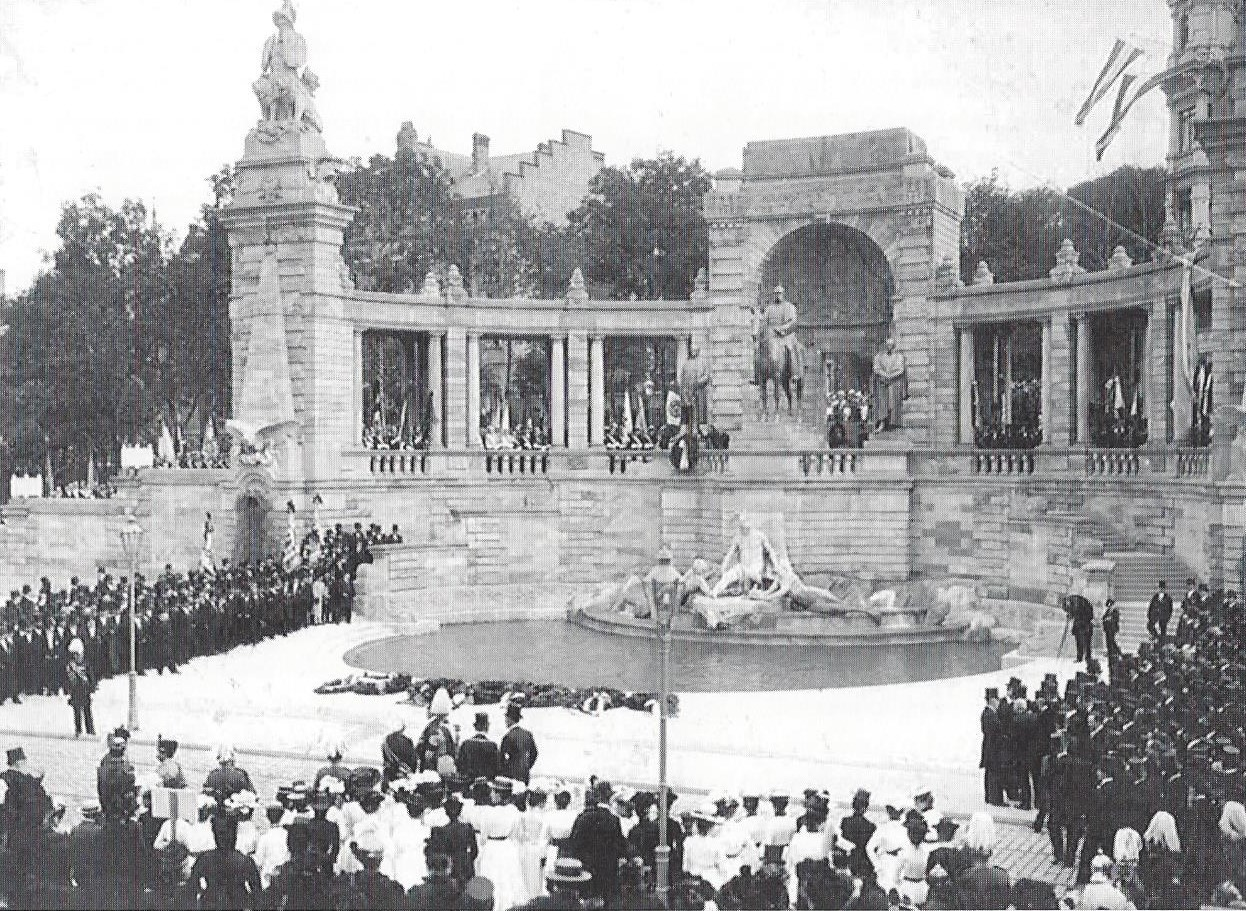 Einweihung des Kaiser-Wilhelm-Denkmals an der Poststraße (heute Hansering). Wegen des Todes der Mutter von Kaiser Wilhelm II. (der Schwiegertochter des mit dem Denkmal geehrten Kaisers Wilhelm I.) erfolgte die Feier unter Landestrauer. Ehrengast war Friedrich Heinrich Prinz von Preußen. Links die Mitglieder des Denkmalkomitees, rechts Behördenvertreter, im Säulengang links Korporationen, rechts Kriegervereine. Vor dem Kaiser stehen die Paladine v. Bismarck (links) und v. Moltke (rechts). Ein Prokommunist verübte 1923 einen Sprengstoffanschlag auf das Kaiserdenkmal. Das Moltke-Denkmal wurde beschädigt und wiederhergestellt. Bei der Enthüllung am 11. Mai 1924 suchten die rechten Wehrverbände die Kraftprobe mit der preußischen Regierung, die Veranstaltungen und Umzüge unter freiem Himmel verboten hatte.